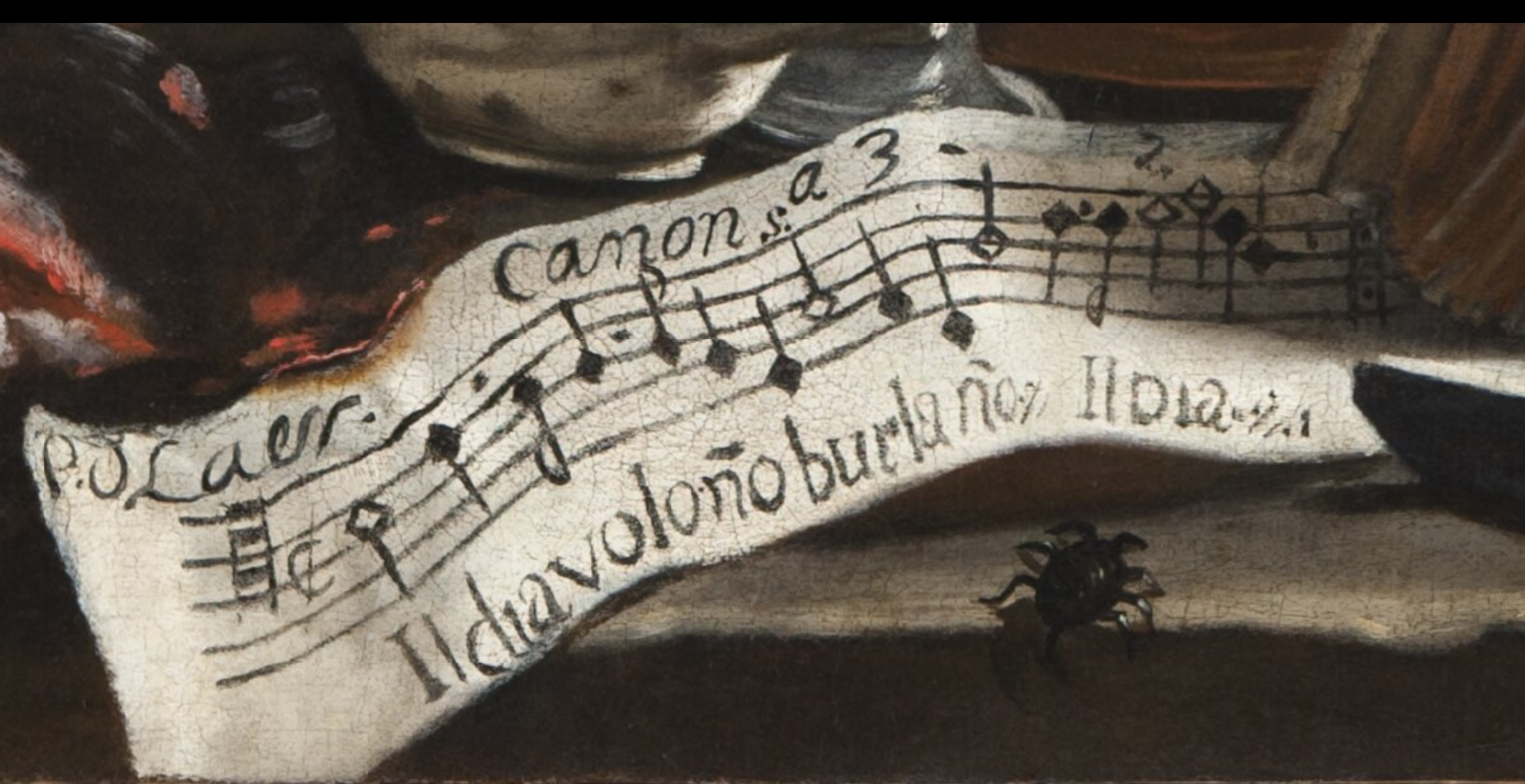 Autoritratto con scena magica - particolare